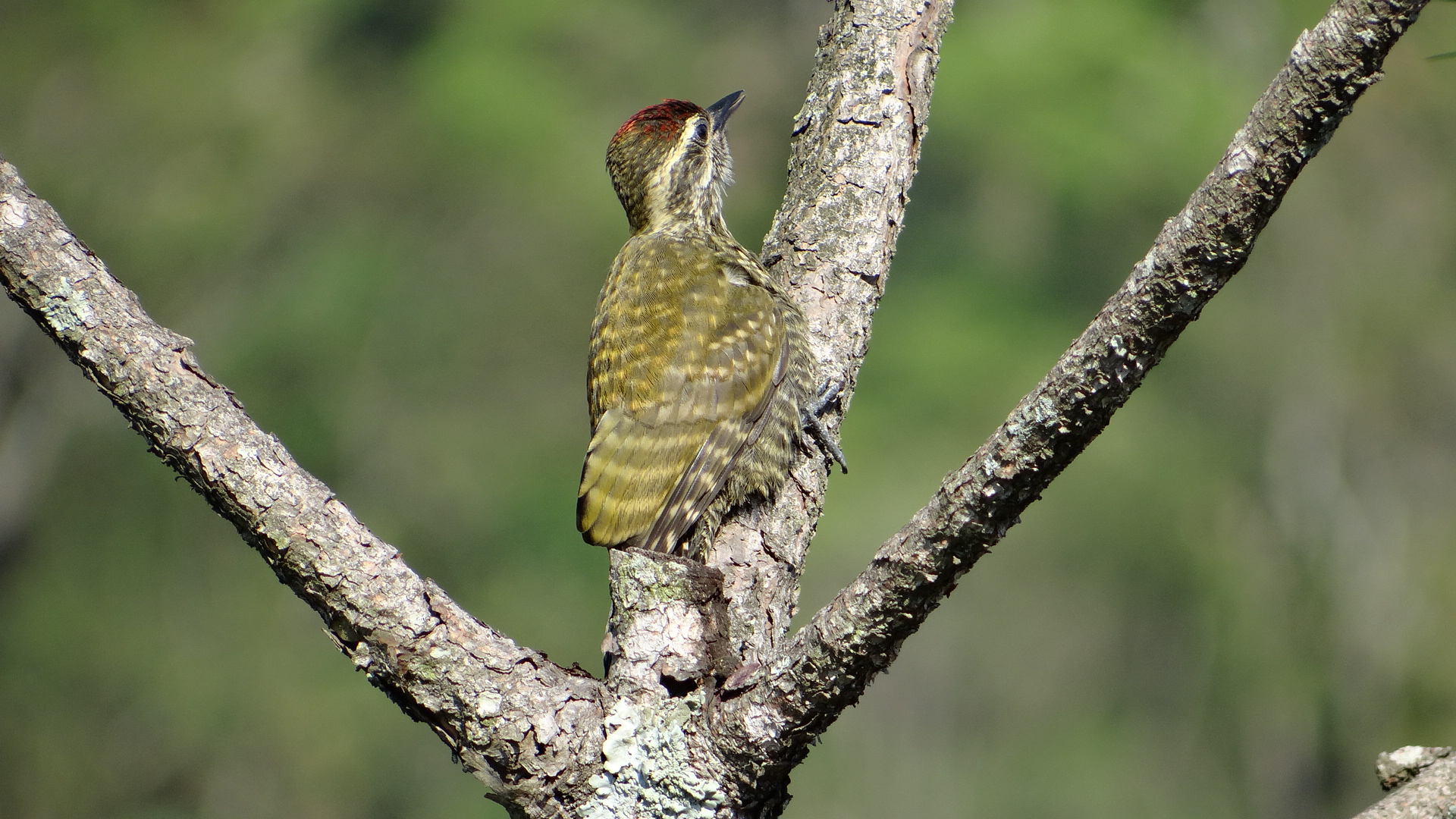 Pássaros de Nazaré Paulista 8